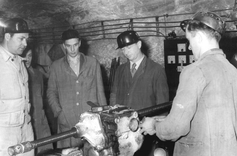 Dorndorf, Kaliwerk "Einheit, Elektrowerkstatt, Bergarbeiter Zentralbild Köhne So.-Eb. 26.10.1958 Kandidat der Volkskammer Otto Funke bei den Kalikumpeln. Der Kandidat der Volkkammer und Erste Seketär der Bezirksleitung Suhl der SED, Otto Funke, der sich seinen Wählern am 24.10.1958 im Kaliwerk "Einheit" Dorndorf, Schacht Springen, vorstellte, besuchte am Vormittag des gleichen Tages die Kumpel vor Ort und sprach mit ihen über ihre betrieblichen und persönlichen Probleme. UBz: In der Elektrowerkstatt des Schachtes II (v.l.n.r.: ) Betriebsleiter Siegfried Reschke, der BPO-Sekretär des Kalikombinates Werra, Gerhard Konzycki, Volkskammerkandidat Otto Funke und Schlosser Hans Christ.